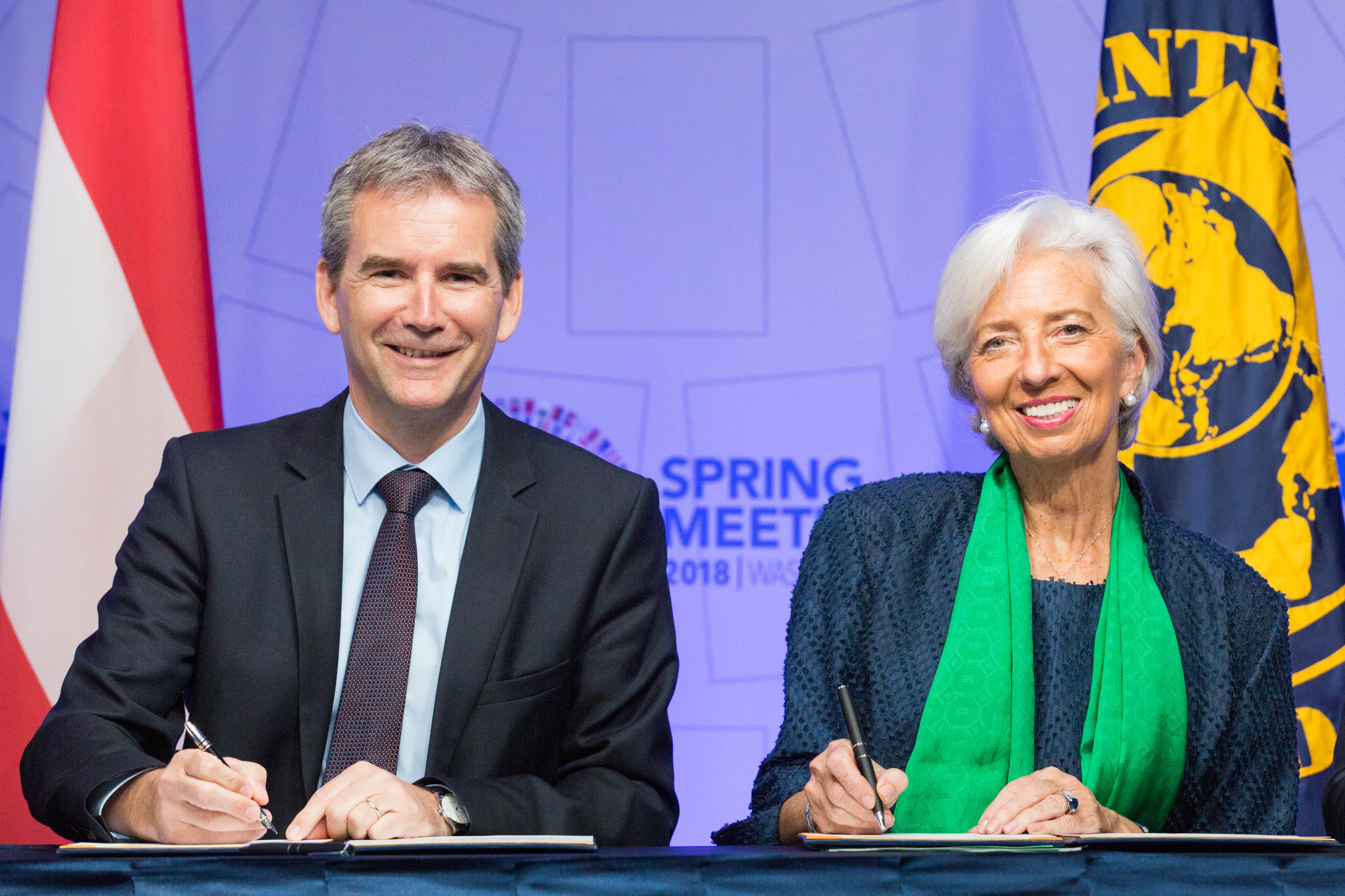 Finanzminister Hartwig Löger und Christine Lagarde, Direktorin des Internationalen Währungsfonds (IWF) unterschrieben am Vormittag, im Rahmen einer kleinen Zeremonie das JVI Memorandum of Understanding.